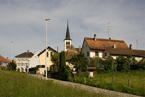 Röschenz